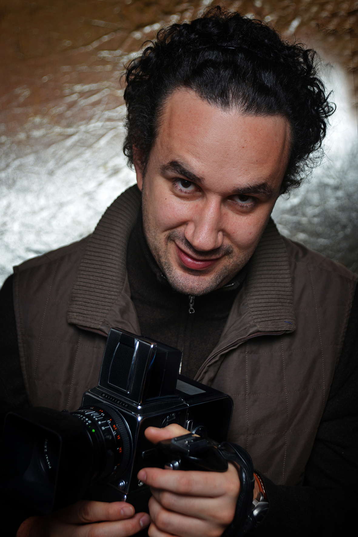 Leonardo Corbucci